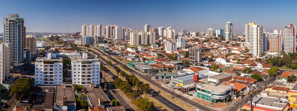 Vista panorâmica cidade de Bauru - zona sul - Av. Nações Unicas